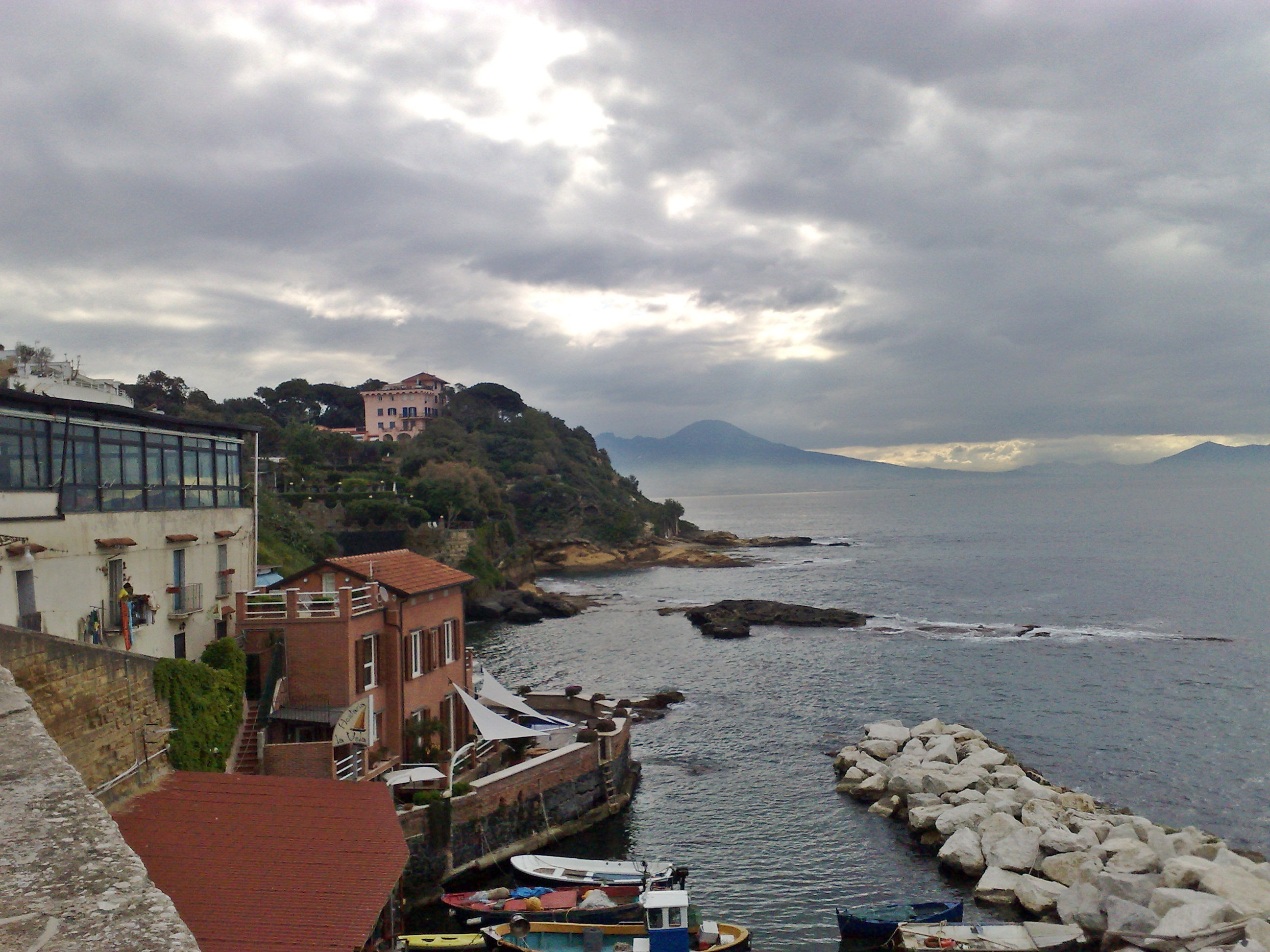 Vesuvio visto da Marechiaro (Napoli)